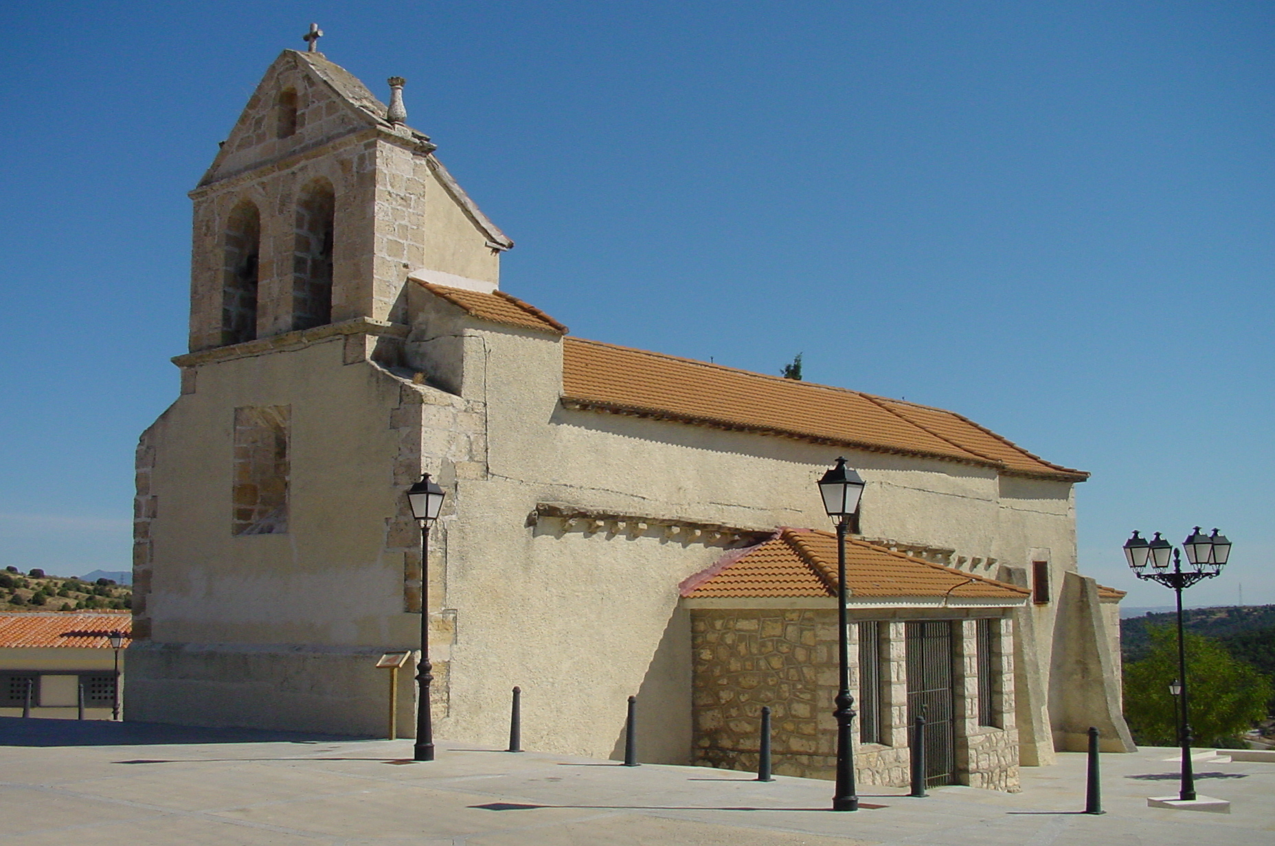 Iglesia en Venturada.